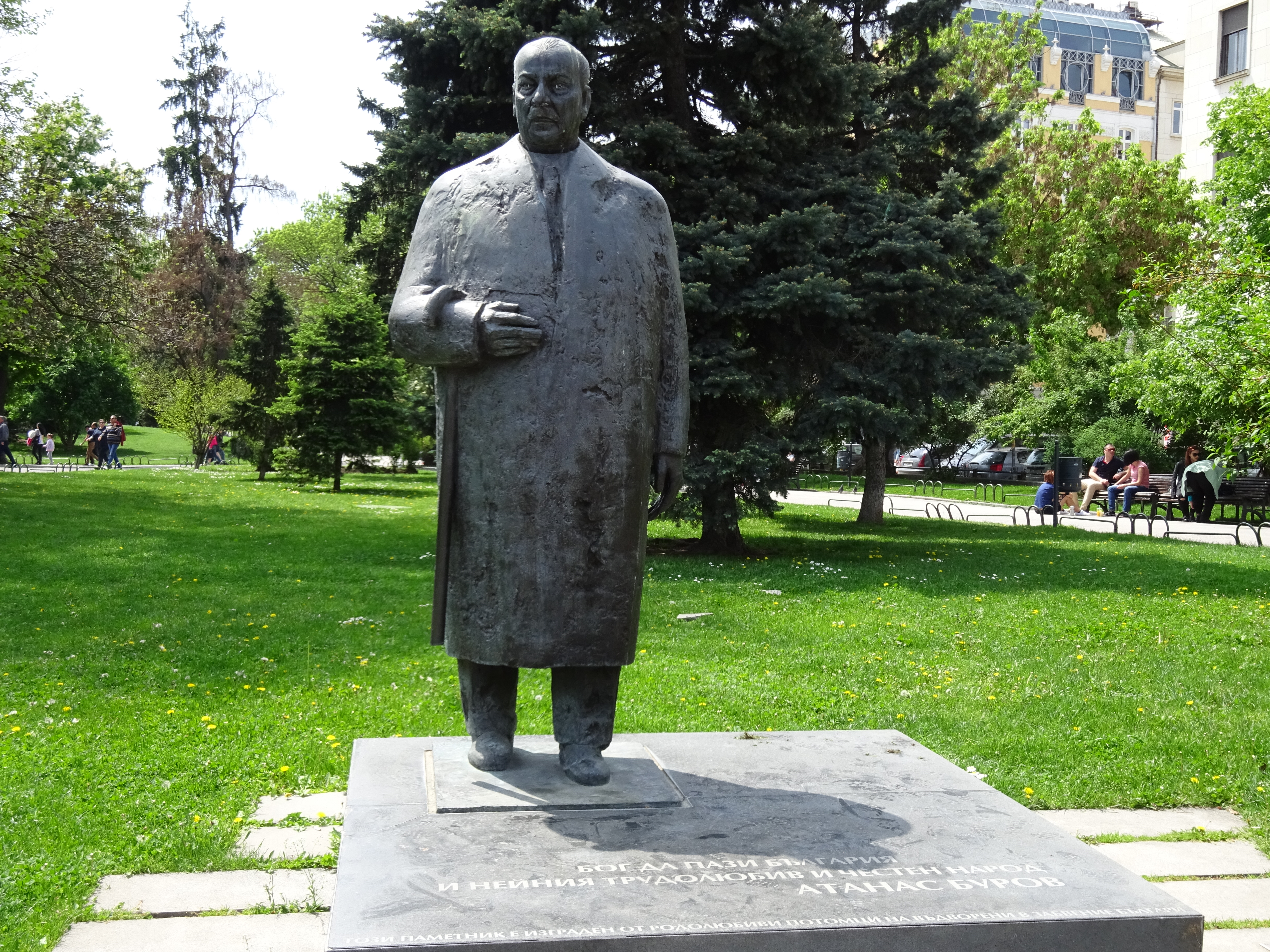 Буров, градинката до Националната банка, София